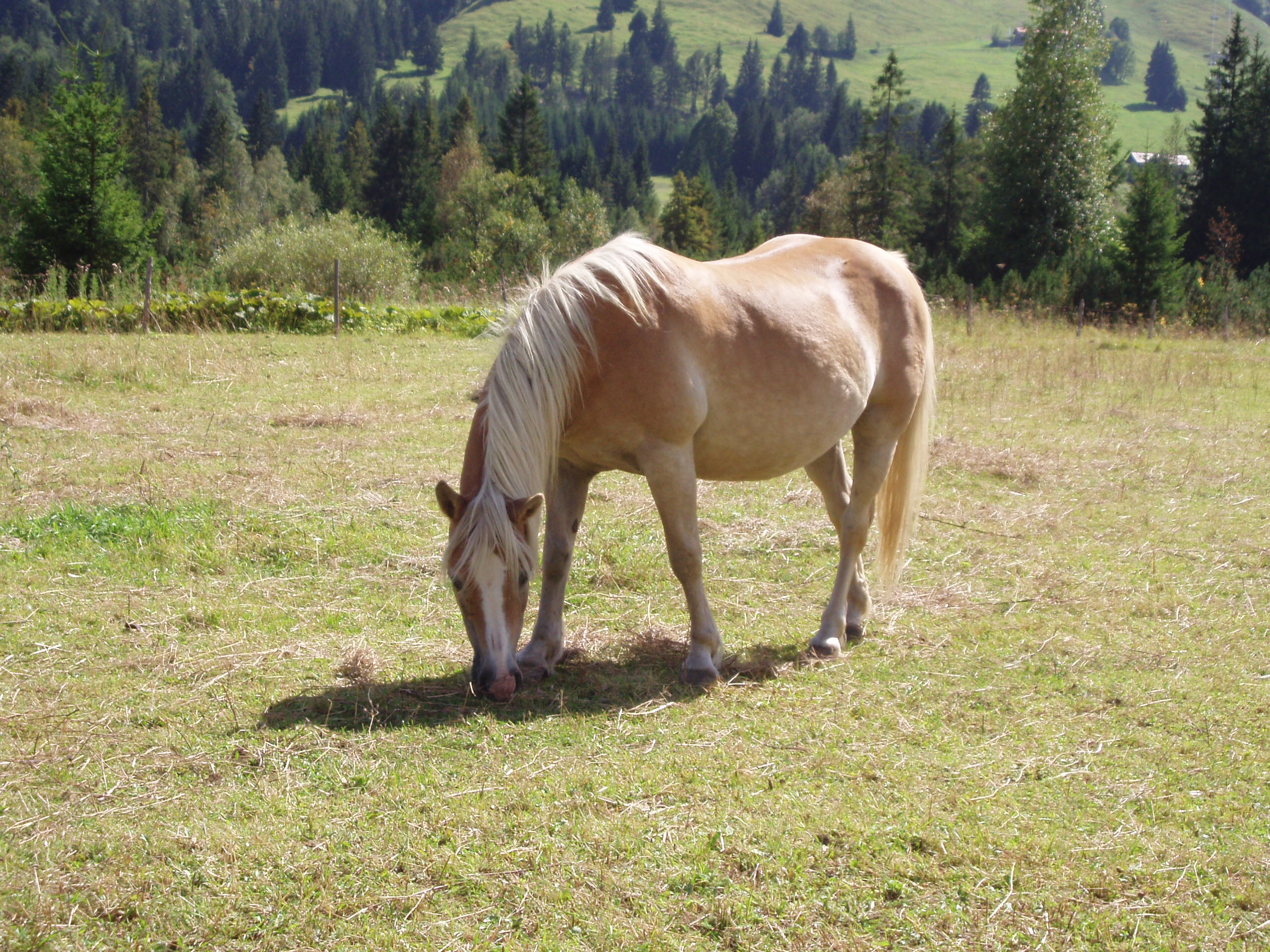 Haflinger